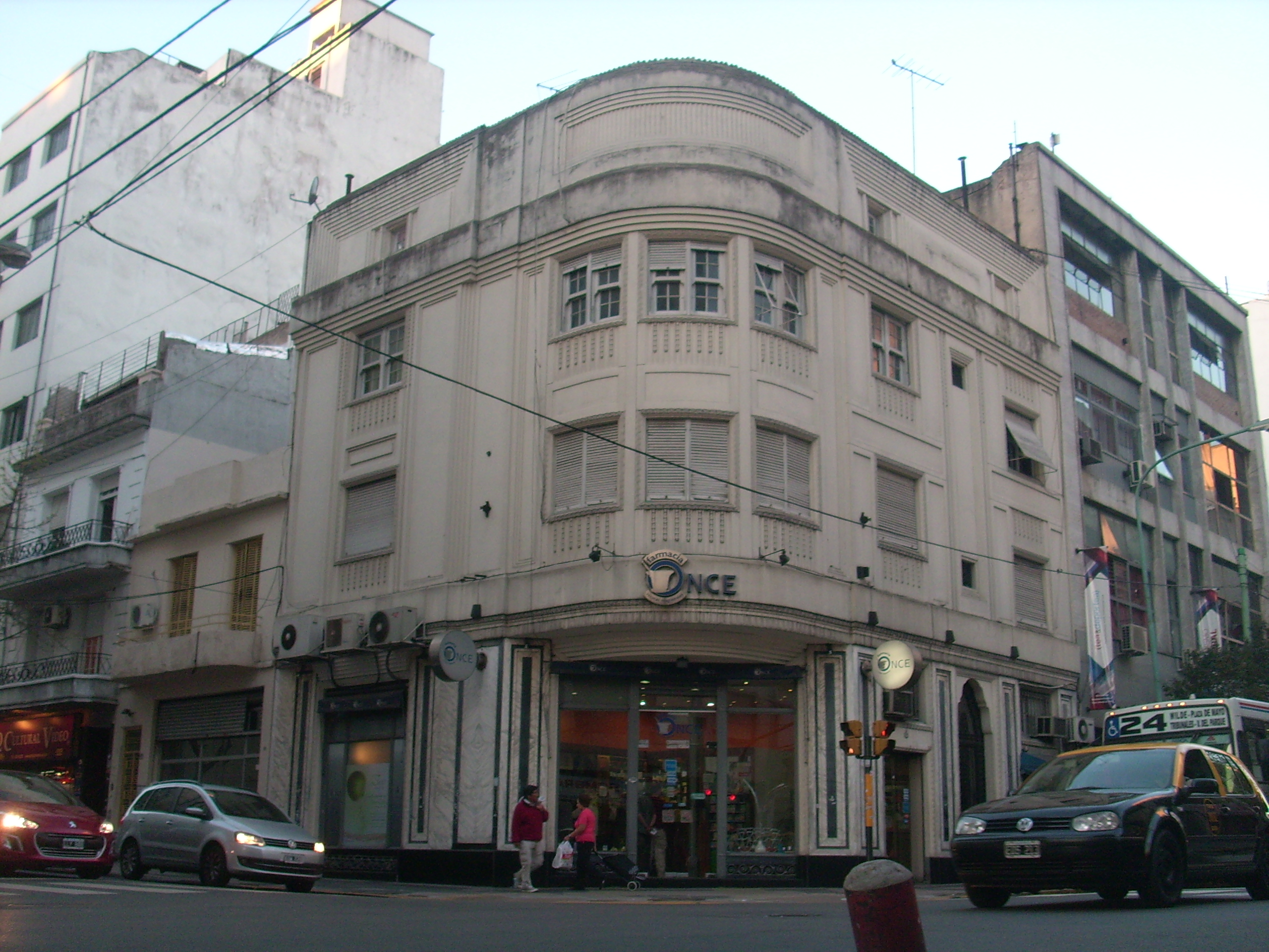 Edificio del Arq. Virasoro (1923). Lavalle 2089, Buenos Aires.